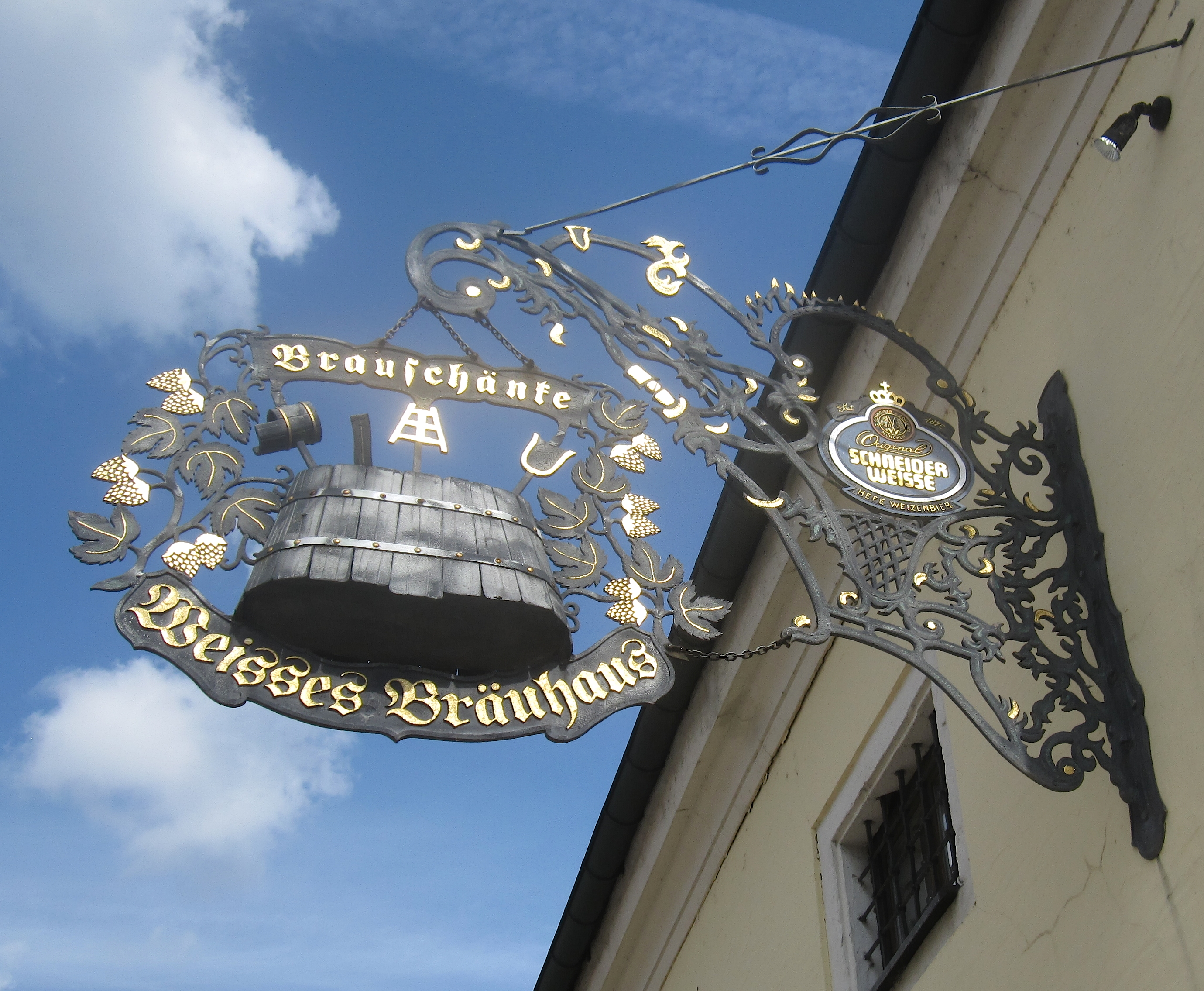 Auslegerschild/Gaststättenschild der Brauschänke Weisses Bräuhaus in Kelheim in Bayern, Deutschland, die zur Privaten Weißbierbrauerei G. Schneider & Sohn mit Sitz in Kelheim gehört.